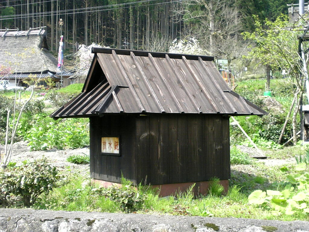 Yao Kayabukinosato in Nantan, Kyoto, Japan